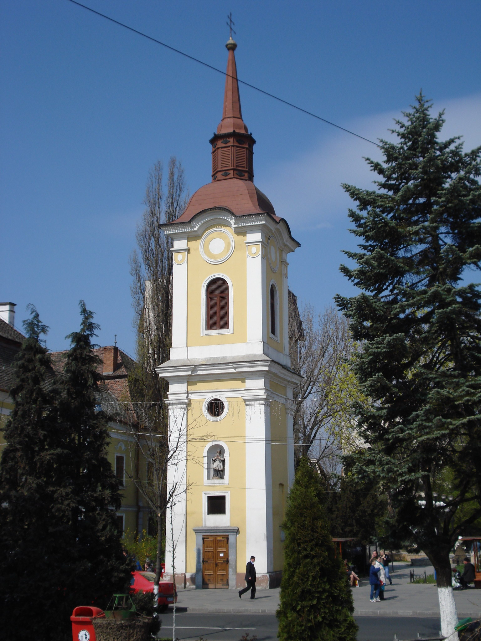 A Barátok-templomának megmardott tornya